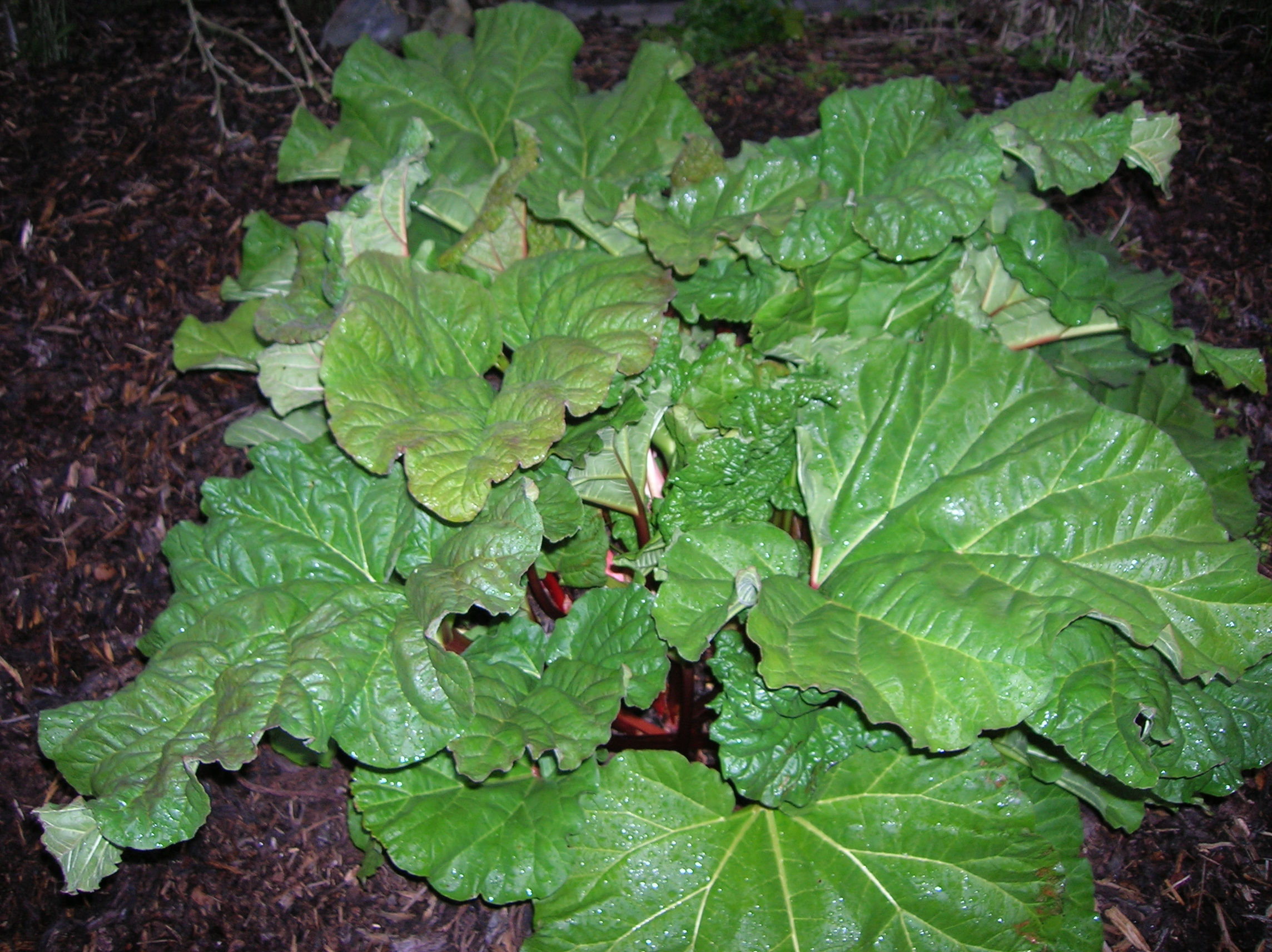 Rheum rhabarbarum (Rabarbra)